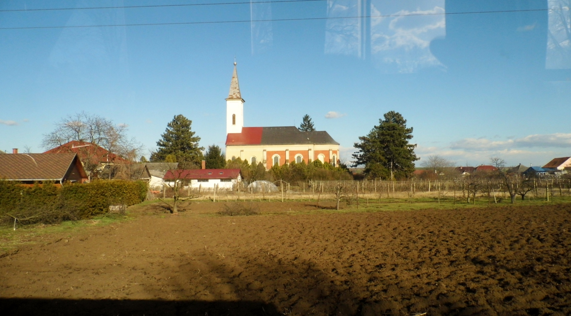 Magyarok Nagyasszonya-templom, Nagytálya